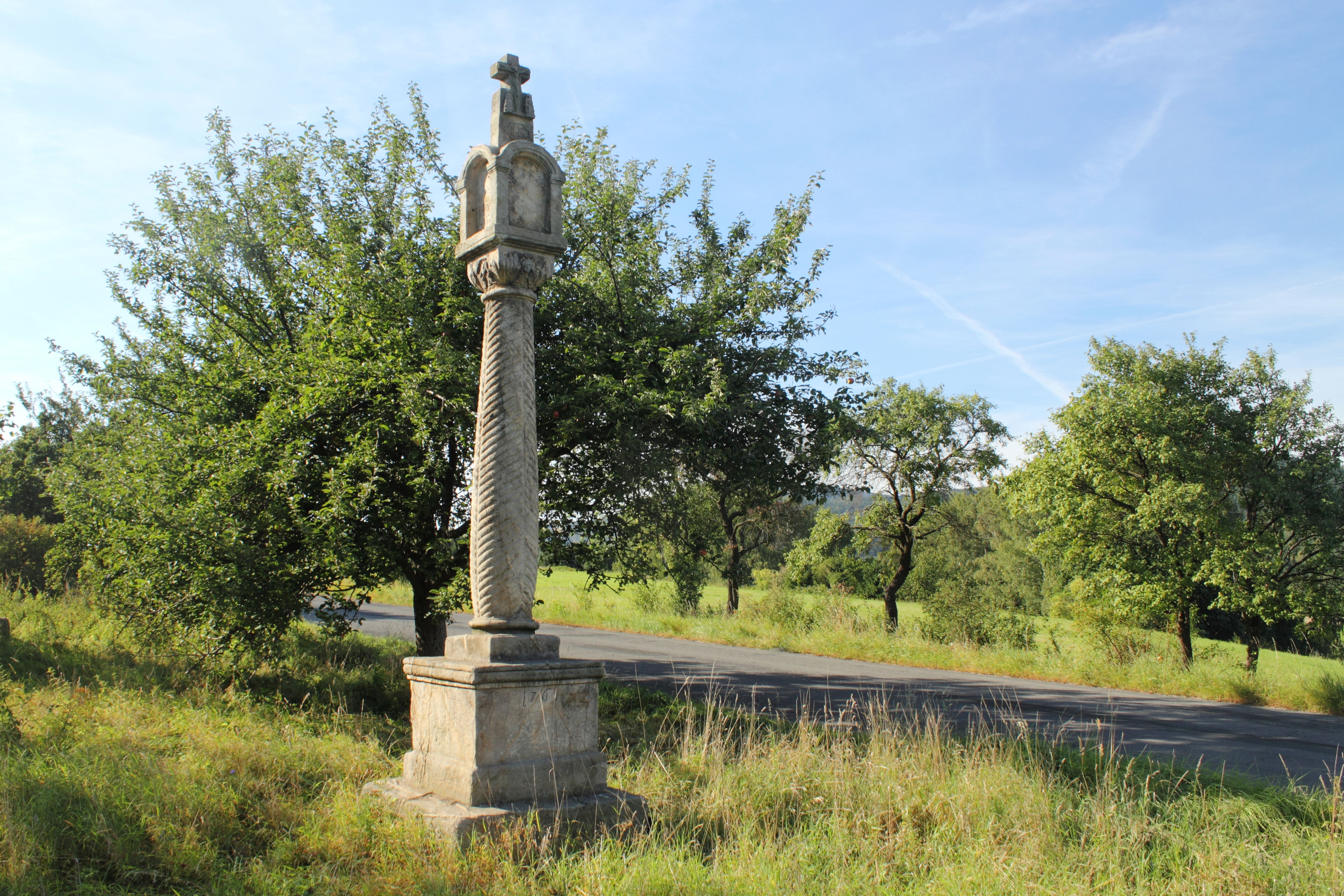 Boží muka při silnici na Petrašovice, Hodkovice nad Mohelkou